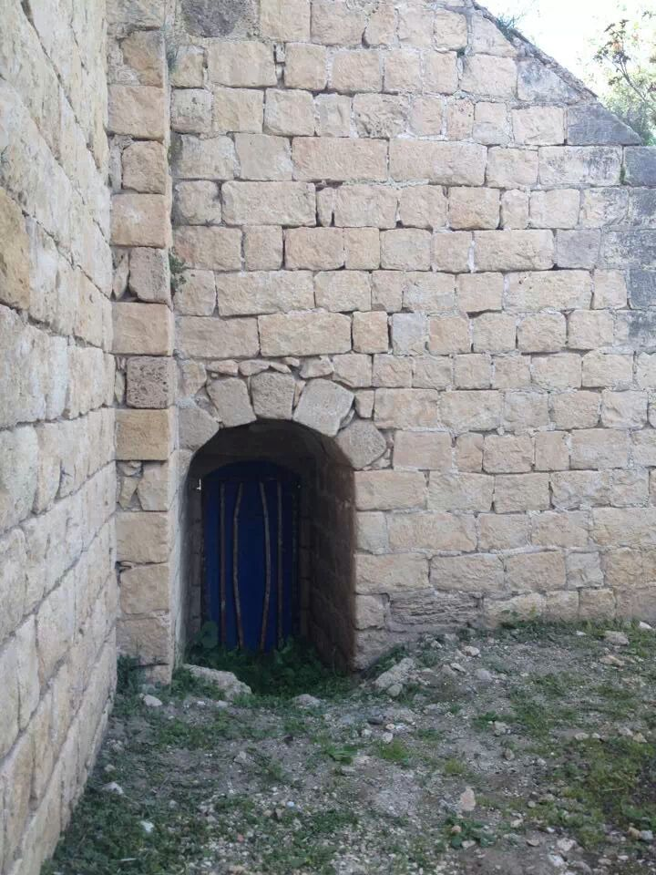 مسجد قريه اجزم